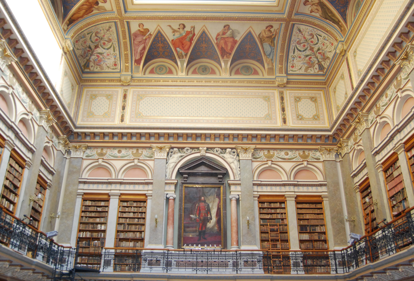 Egyetemi Könyvtár (Budapest 5, Ferenciek tere 6., Reáltanoda utca 2.) This is a photo of a monument in Hungary. Identifier: 466